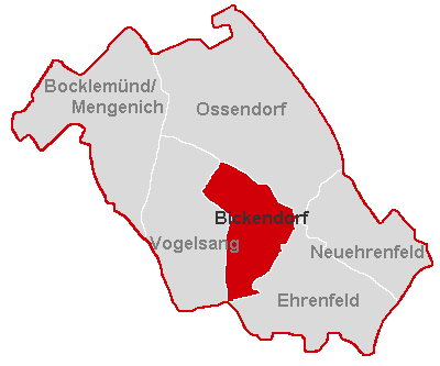 Lagekarte Bickendorf im Stadtbezirk Köln-Ehrenfeld